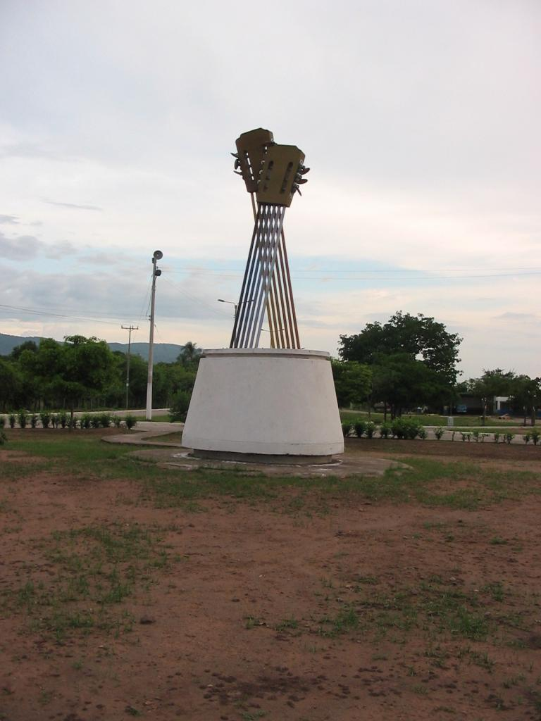 monumento alas guitarras